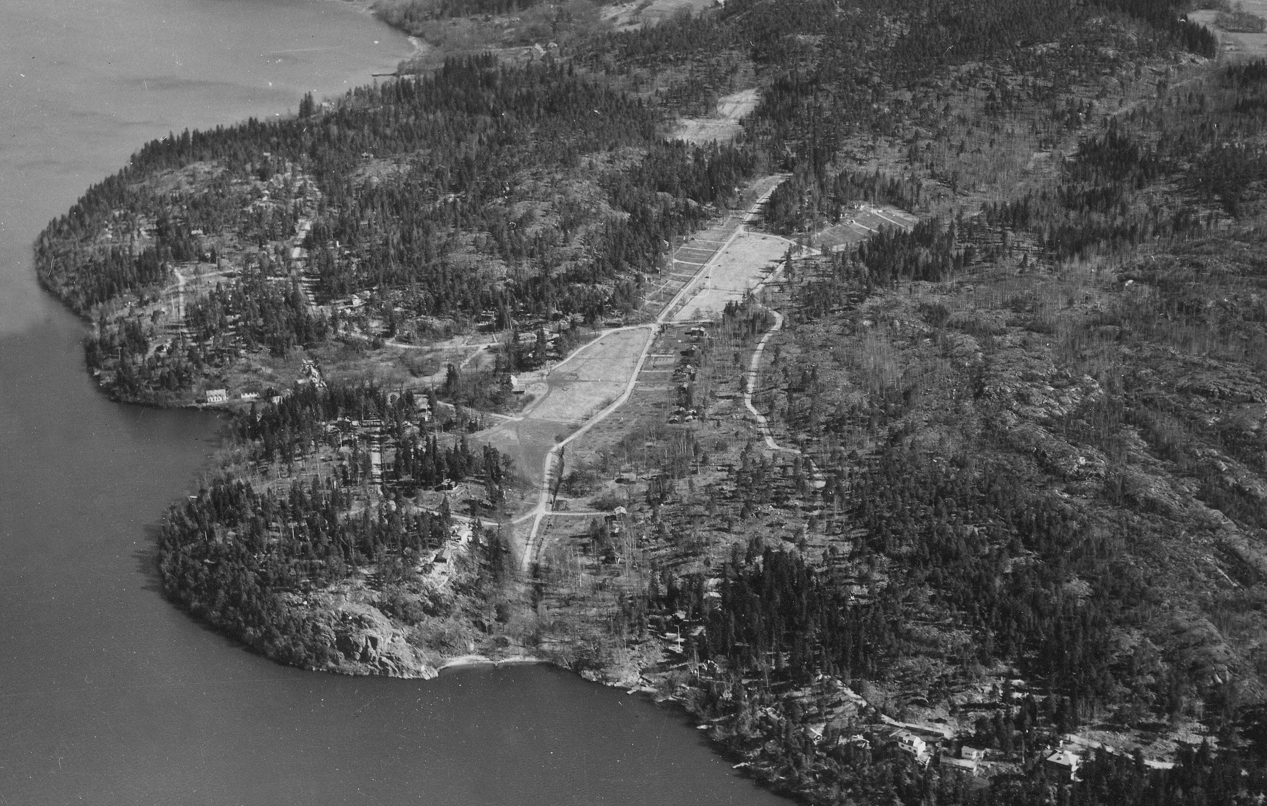 Området Johannesdal vid Mälaren